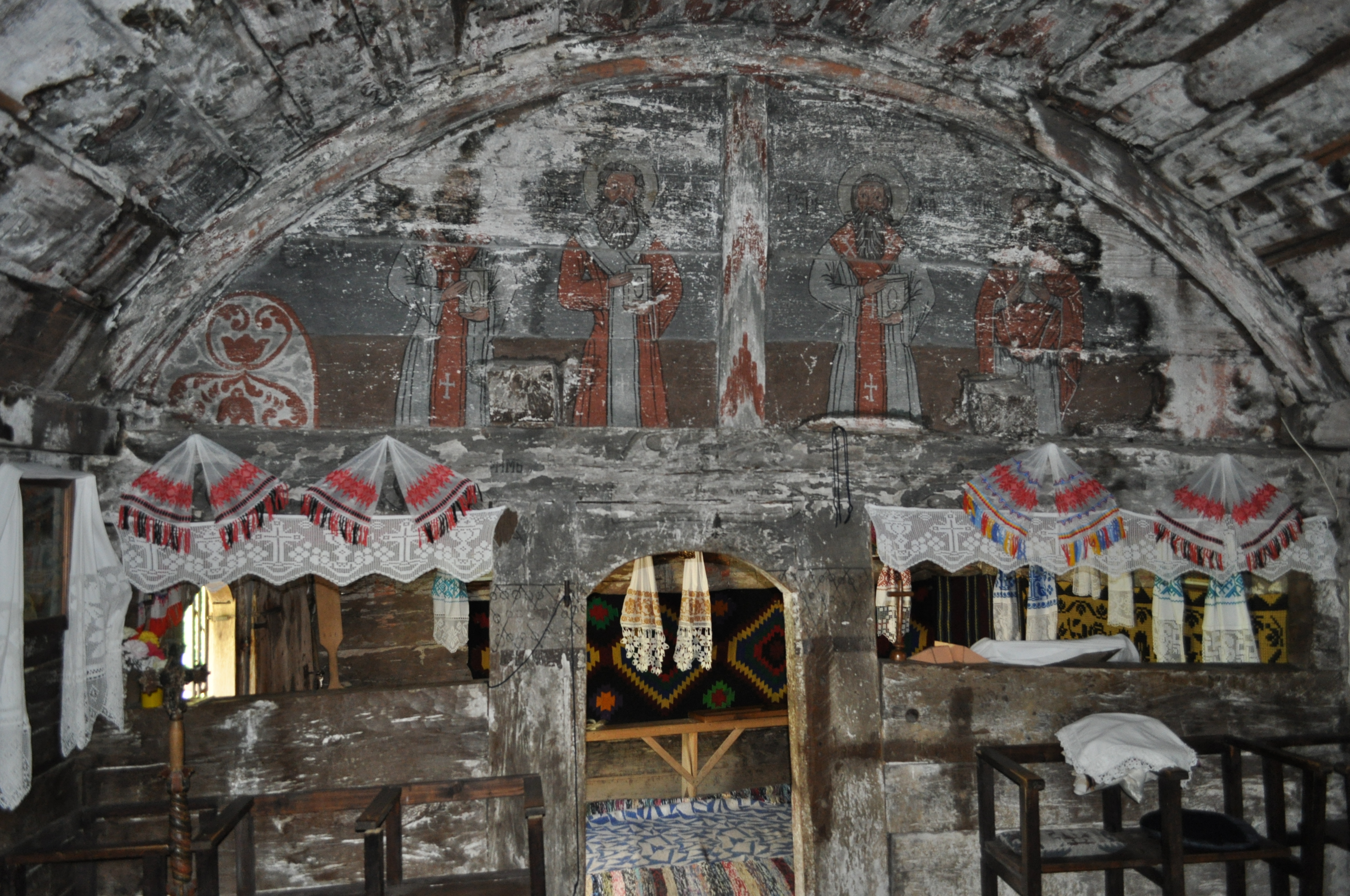 Biserica de lemn din Stolna, județul Cluj